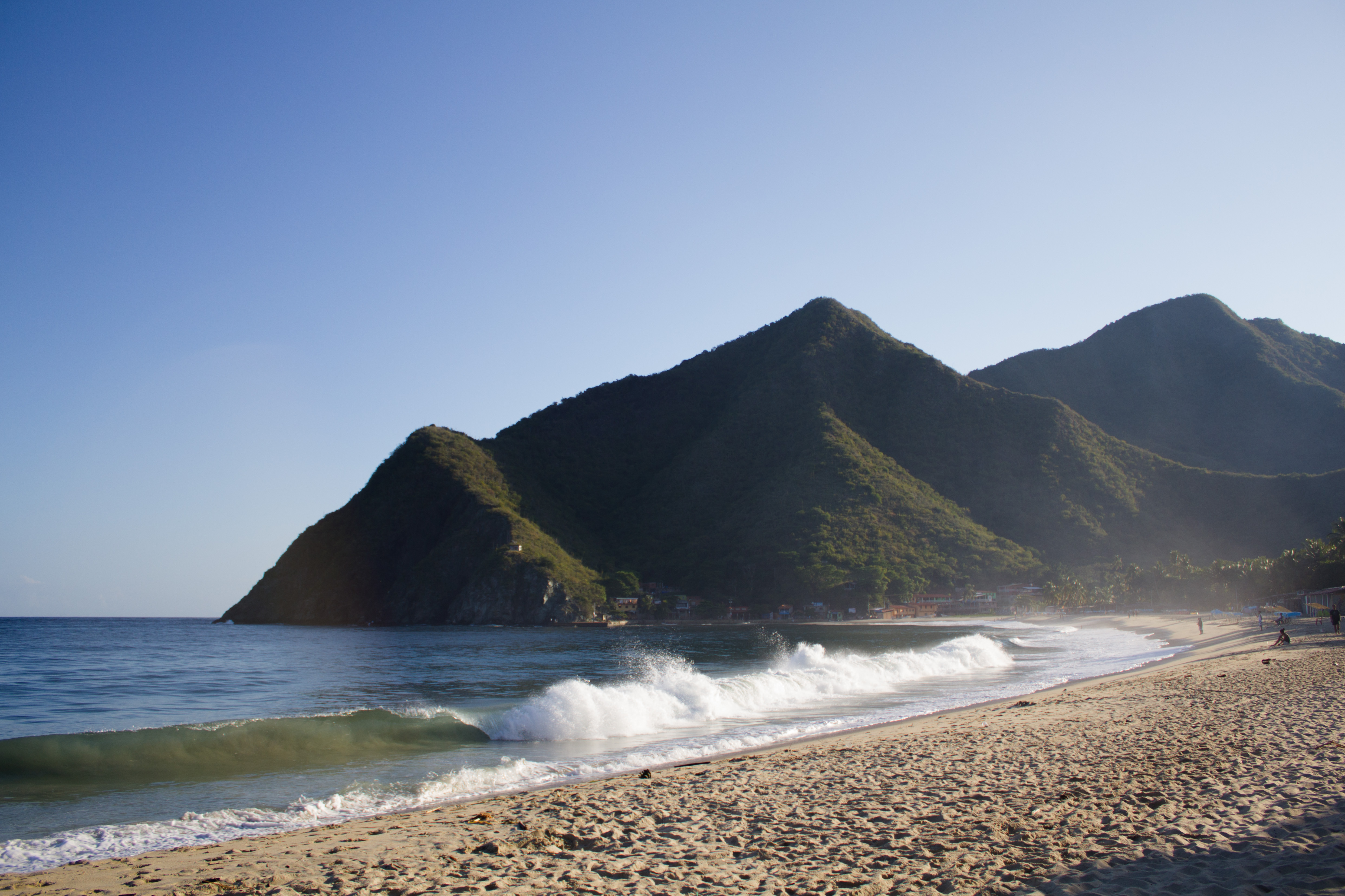 Chuao - Edo. Aragua - Venezuela.